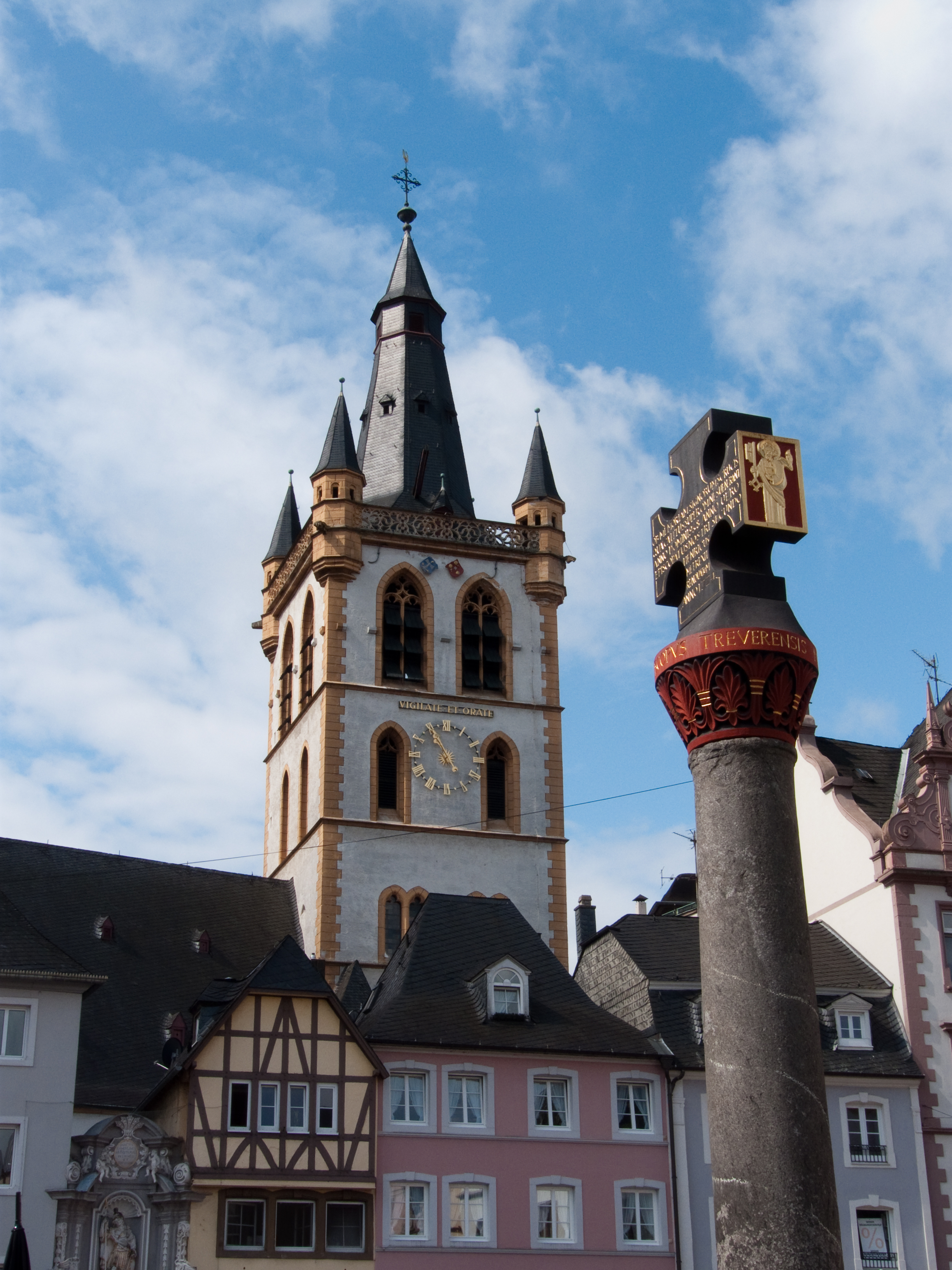 Das alte Kreuz auf dem Trierer Marktplatz mit dem Turm der Marktkirche im Hintergrund.